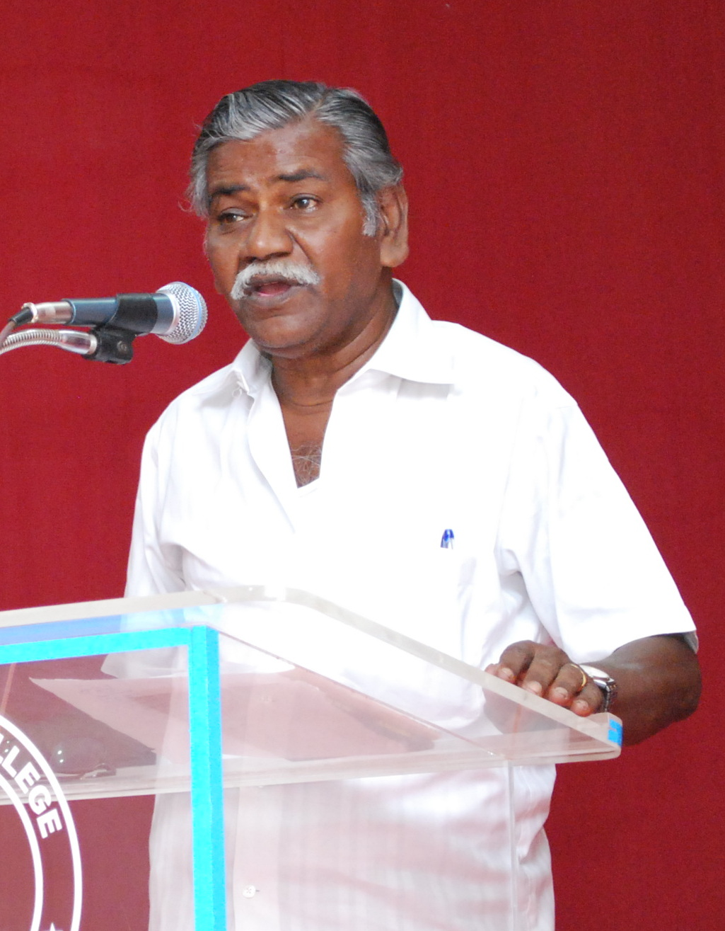 மதுரைக் கல்லூரி ஒன்றில் பேராசரியர் தொ.பரமசிவன் அவர்கள் உரையாற்றும் போது எடுக்கப்பட்ட நிழற்படம்